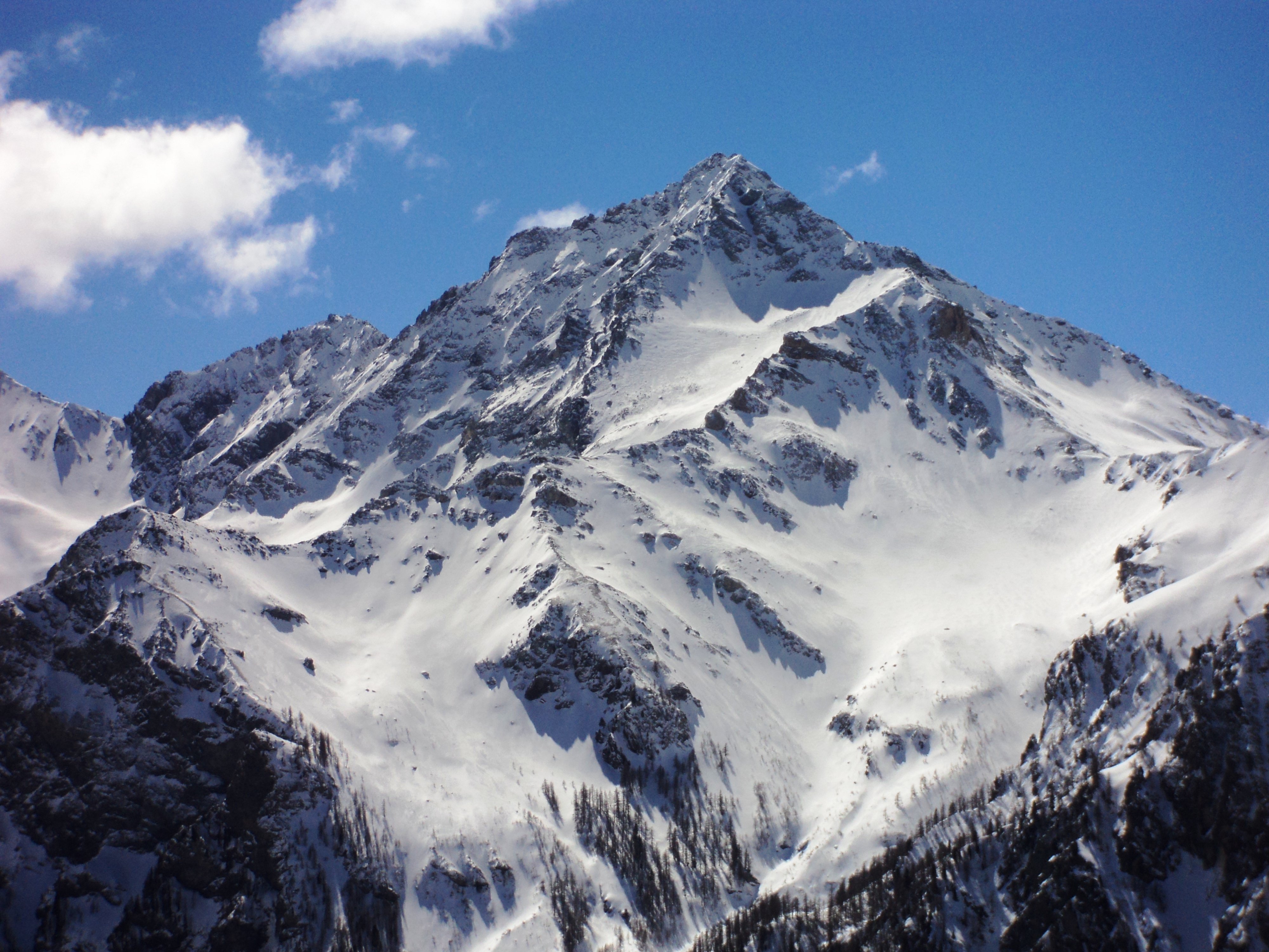 La Rognosa di Sestriere vista salendo il monte Morefreddo